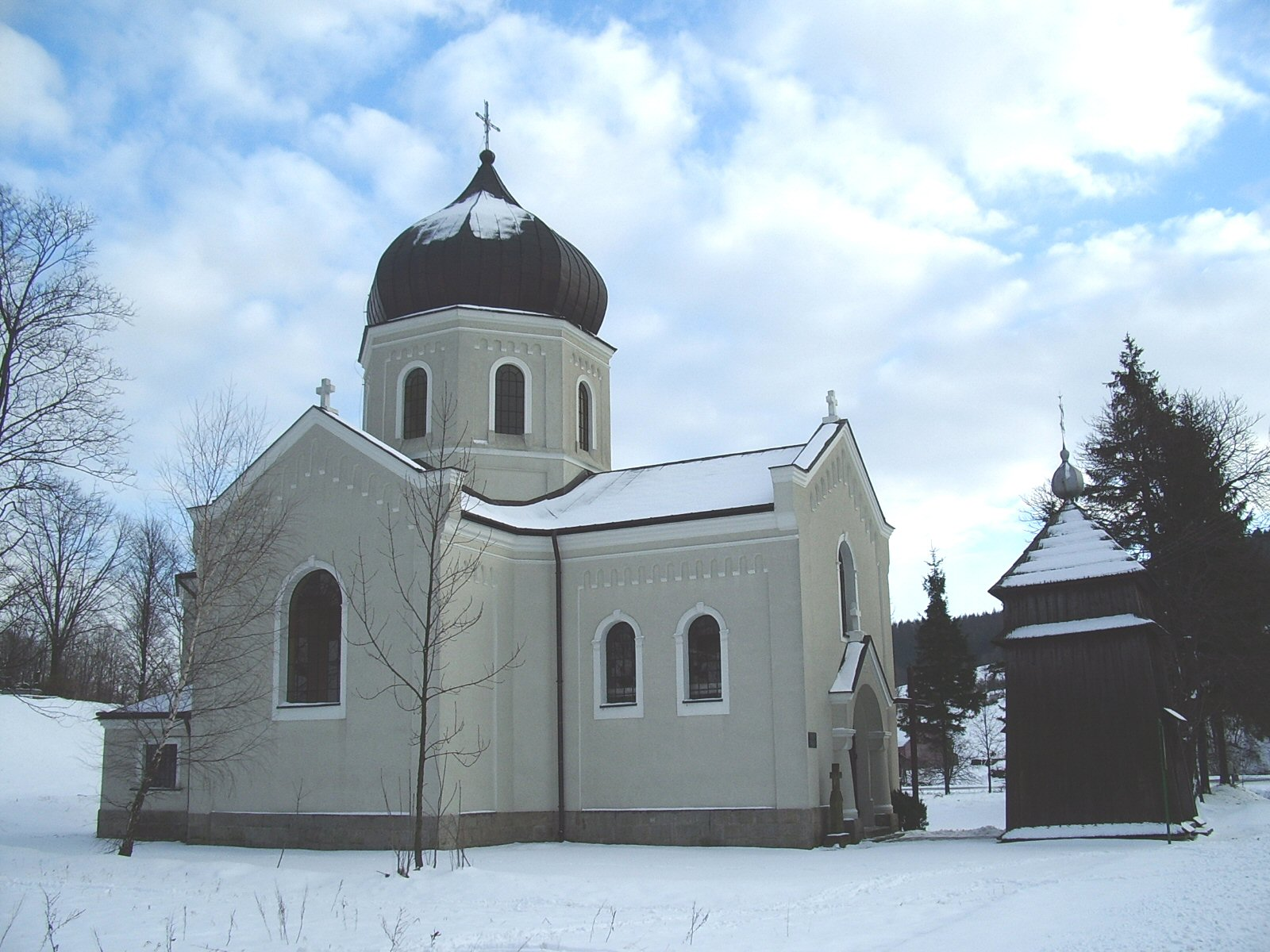 Cerkiew w Pętnej (pow. Gorlice)